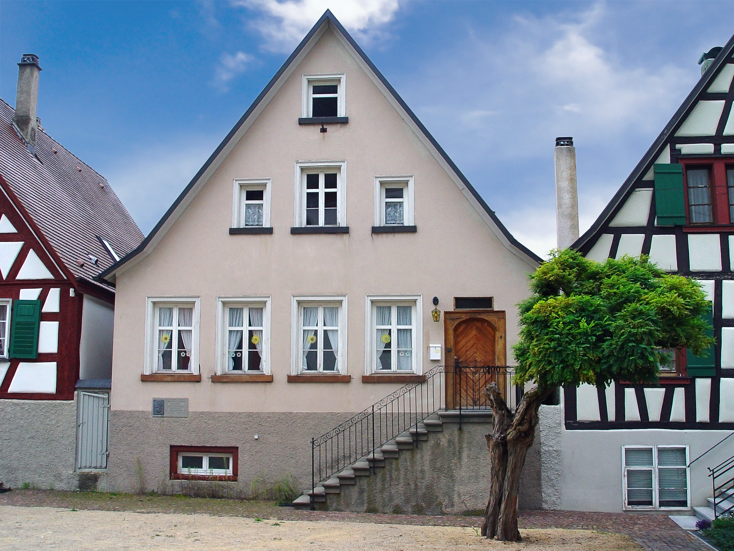 Geburtshaus von Martin Heidegger in Meßkirch, Baden-Württemberg (where Heidegger grew up)- (la maison natale d'Heidegger) - (ハイデッガーの出生地)